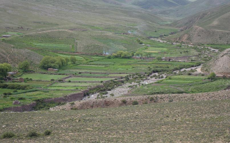 Abra Laite und Quelle des Flusses Río Iruya, von Abra Colorada aus gesehen